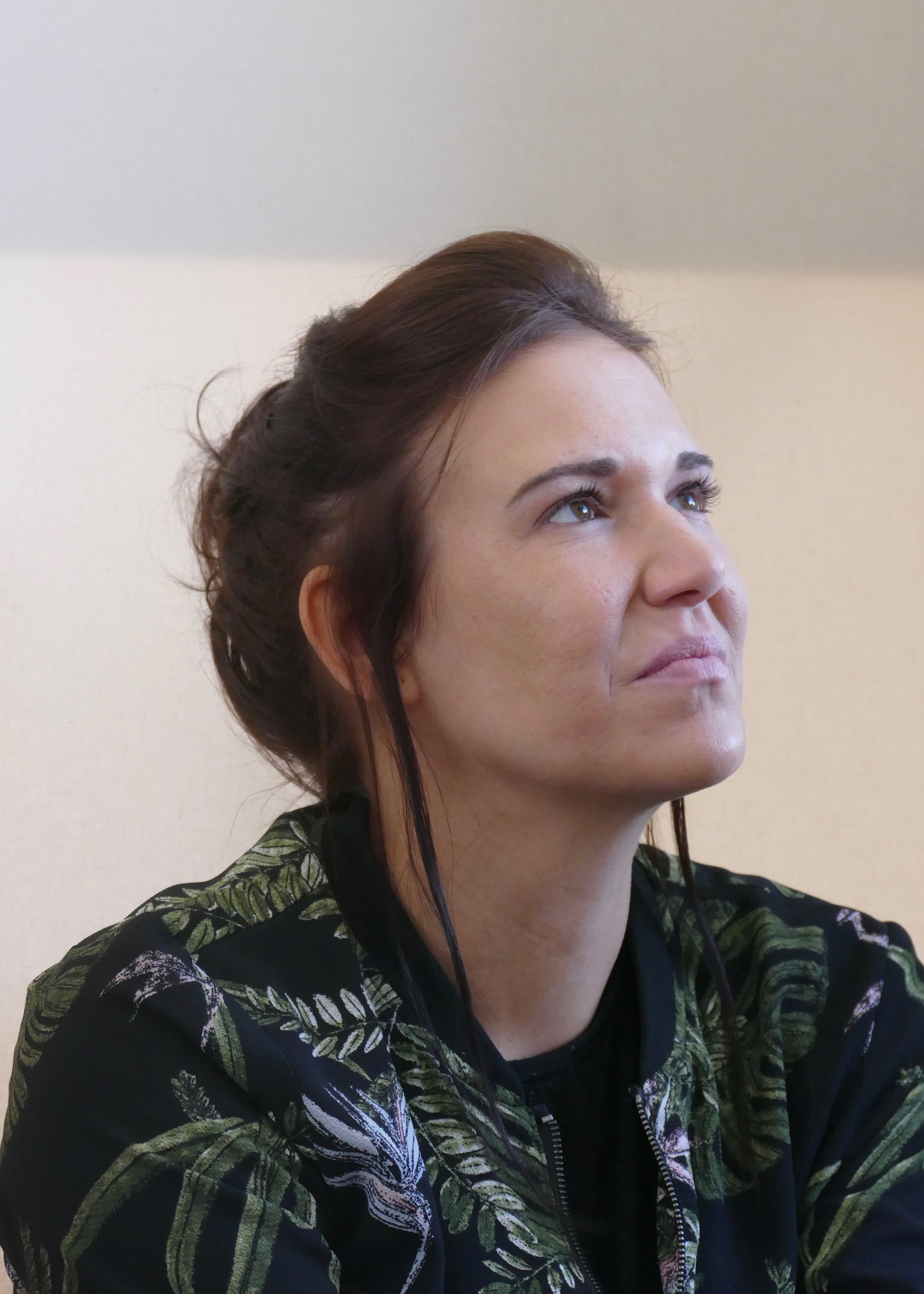 Birgit Birnbacher, Ingeborg Bachmannpreisträgerin 2019